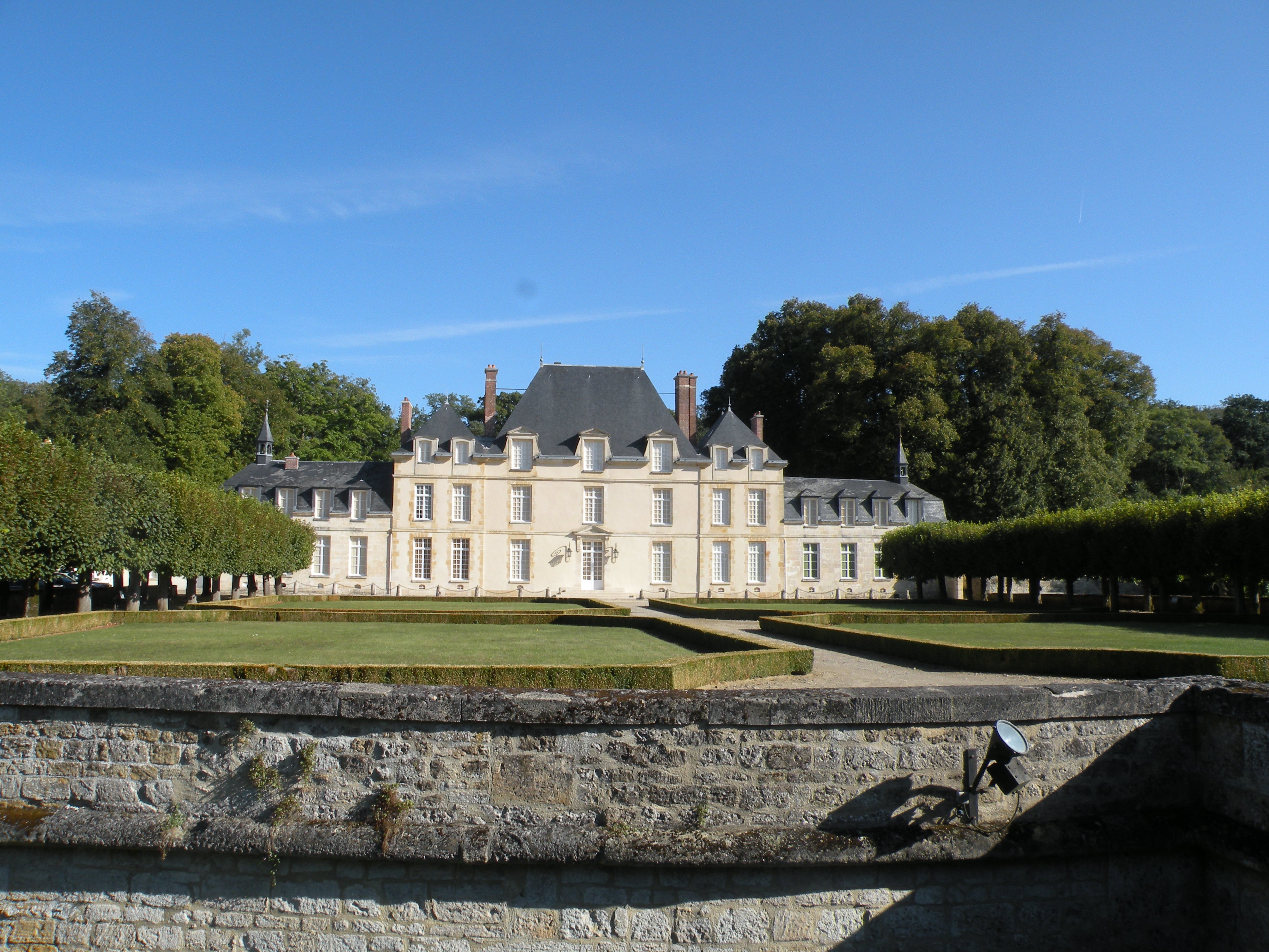 Château de Saint-Cyr (Lavilletertre)